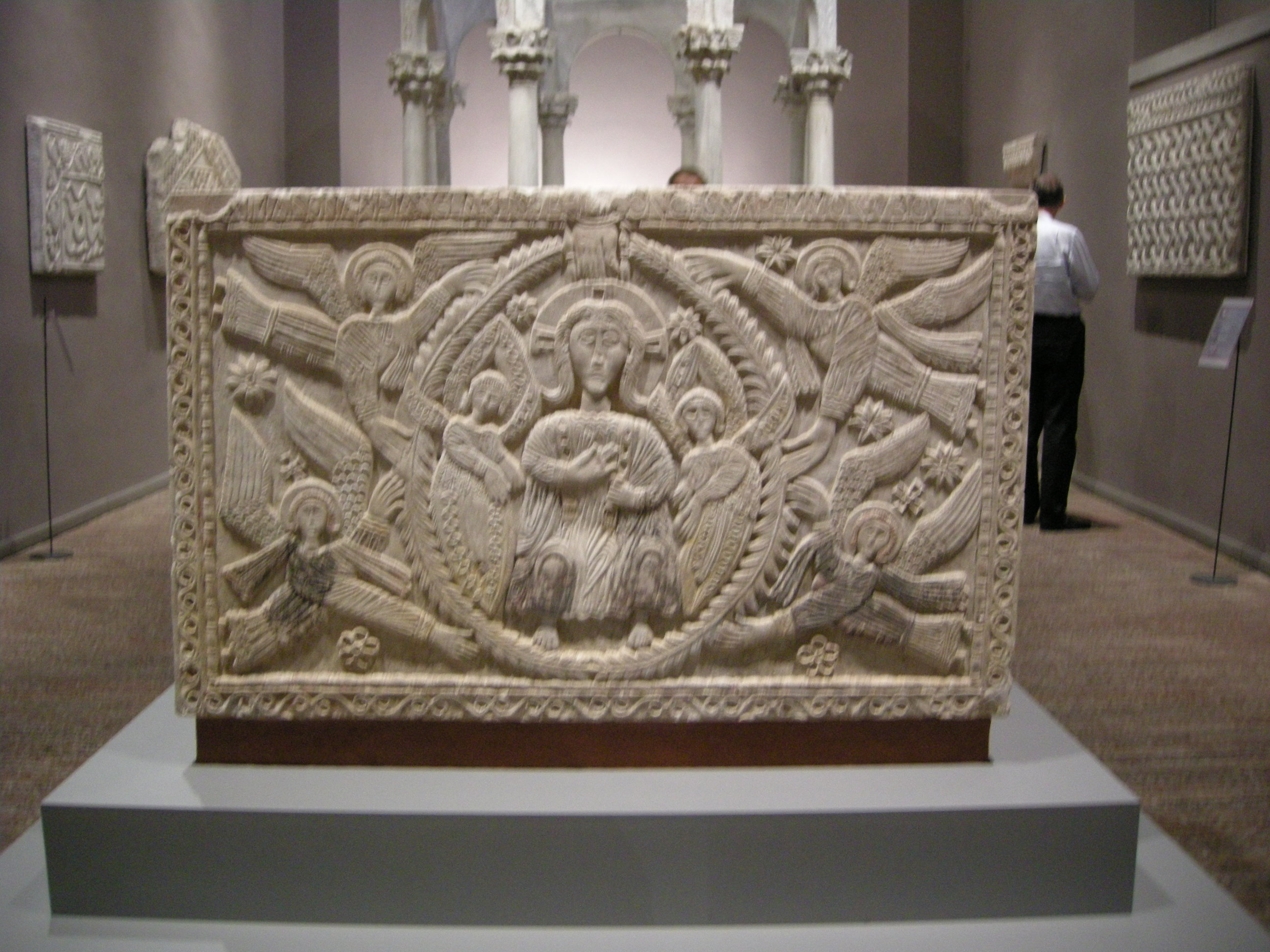 Cividale, museo cristiano, altare del duca rachis